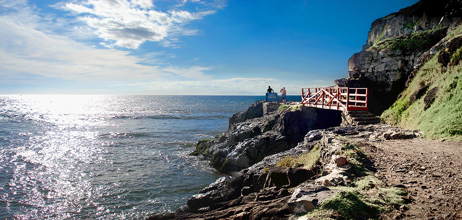 Pontezinha, no Morro das Furnas, Praia da Cal, Torres, Rio Grande do Sul, Brasil.